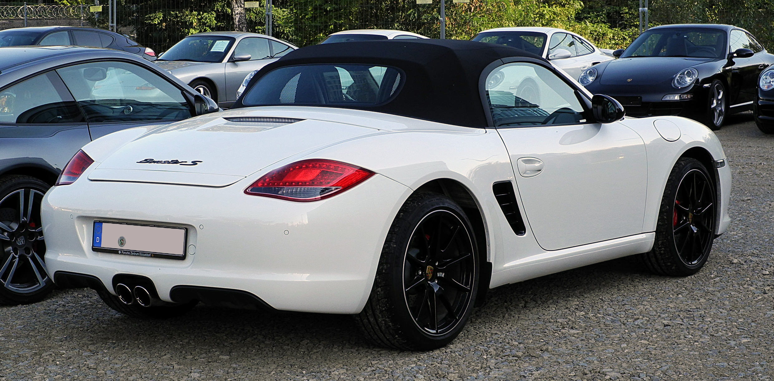 Porsche Boxster S (987, Facelift)